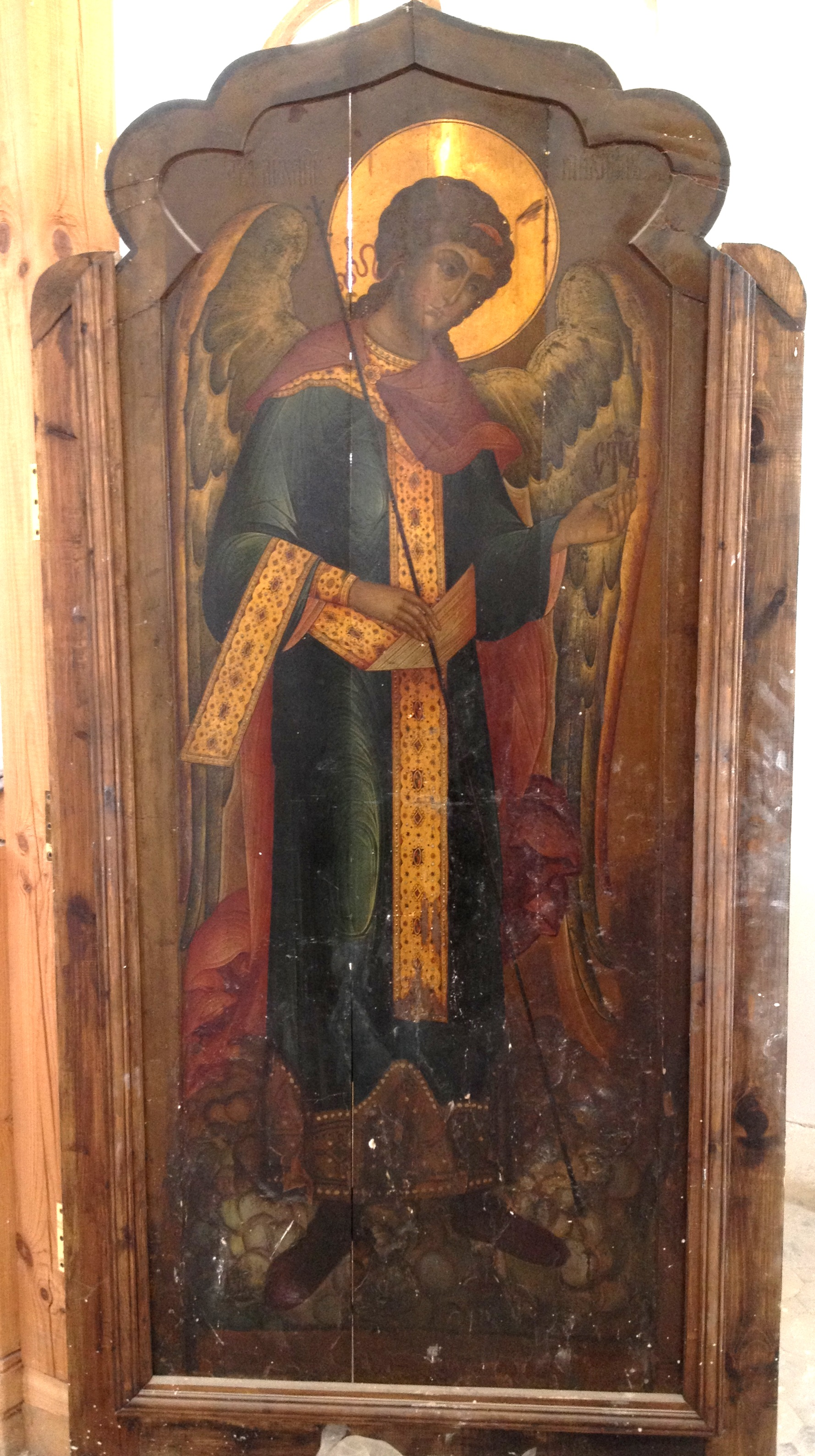 Створка врат в одном из приделов Покровского кафедрального собора Казанско-Вятской епархии Русской Православной Старообрядческой церкви (г. Казань).